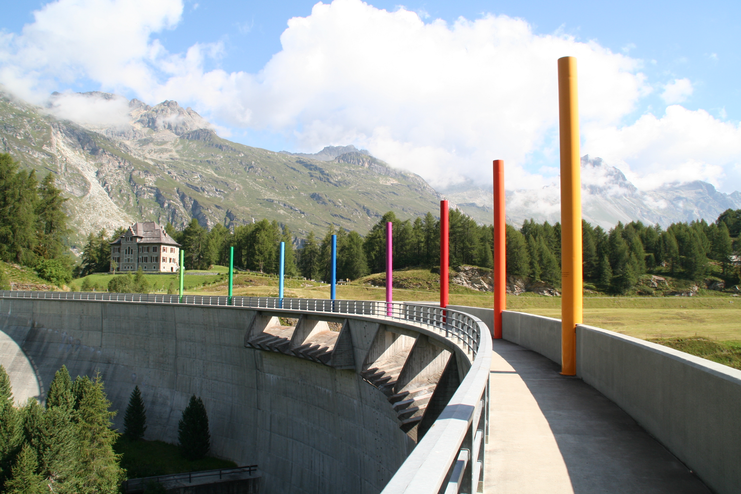 Culurs